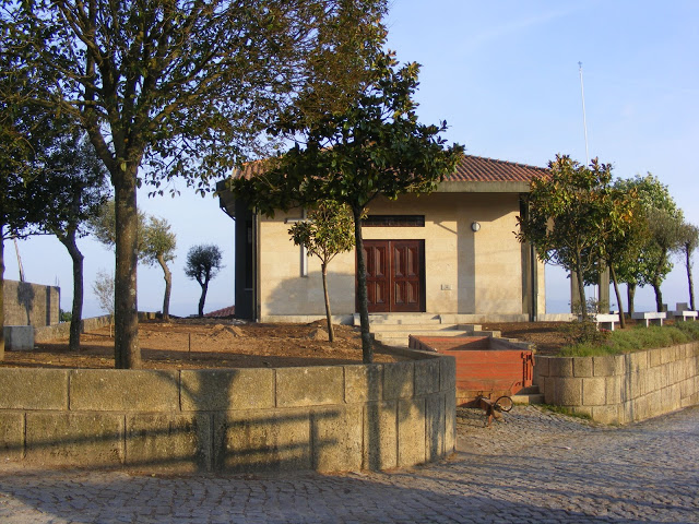 Amarante Freixo de Cima Capela de Nossa Senhora do Leite São Gens